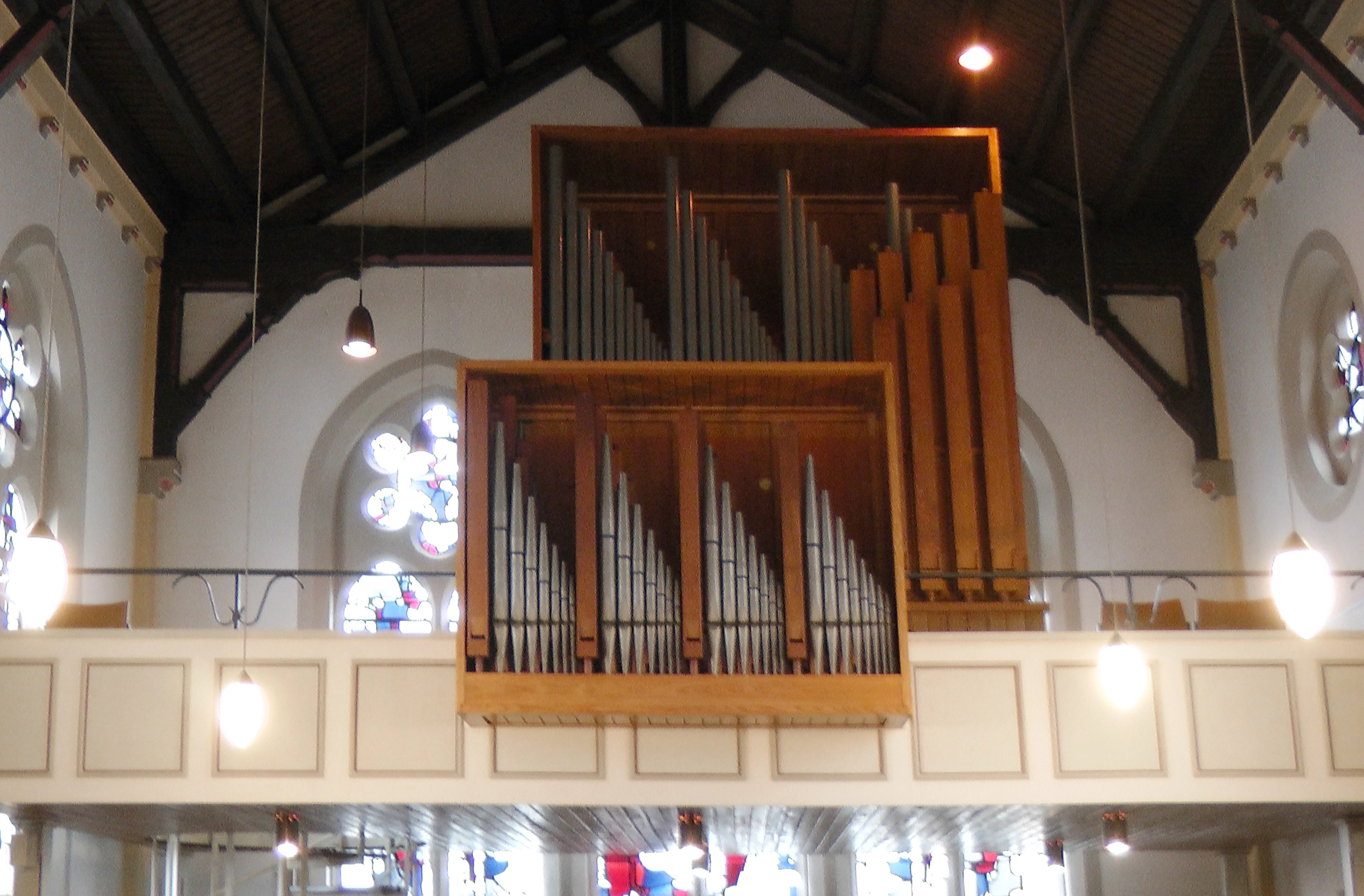 Evangelische Kirche Konz-Karthaus Orgel